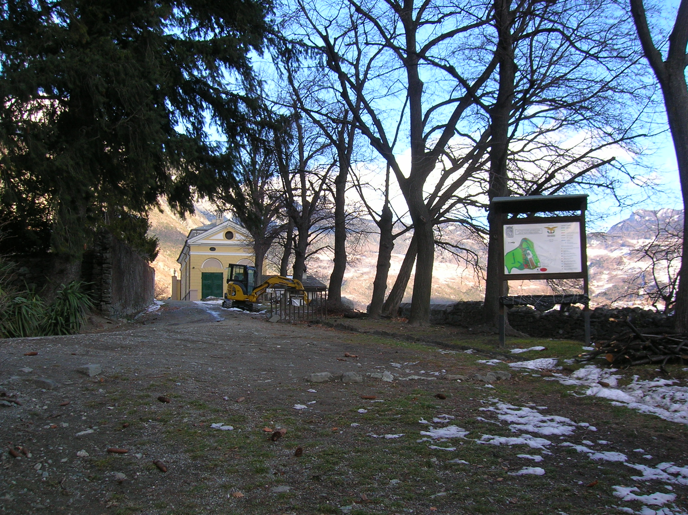 Ingresso del parco del Castello Passerin d'Entrèves, in fase di sistemazione e chiuso per l'inverno. Châtillon, Valle d'Aosta, Italia.